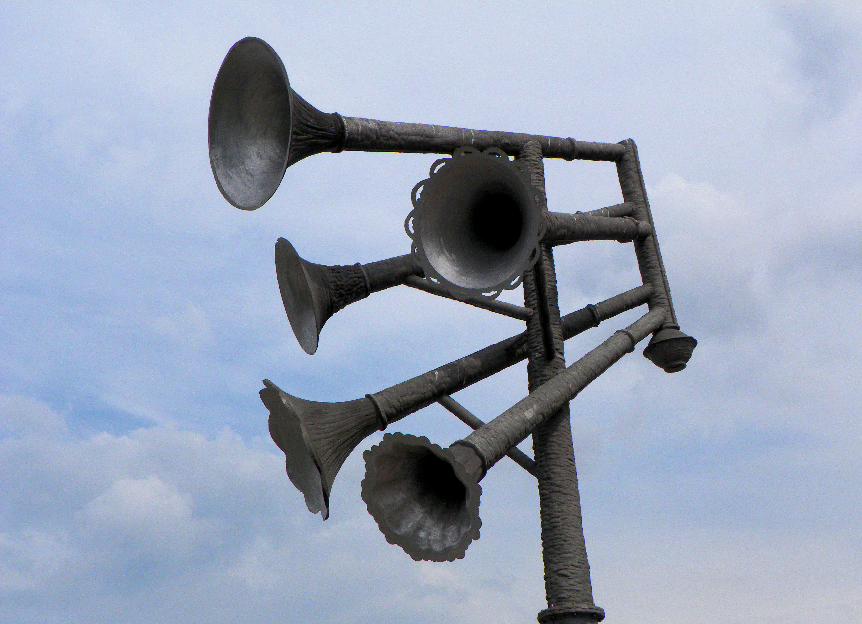 Toetertoren (2008) van Alphons ter Avest